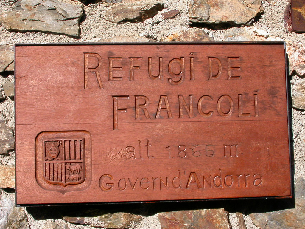 Refuges Andorre